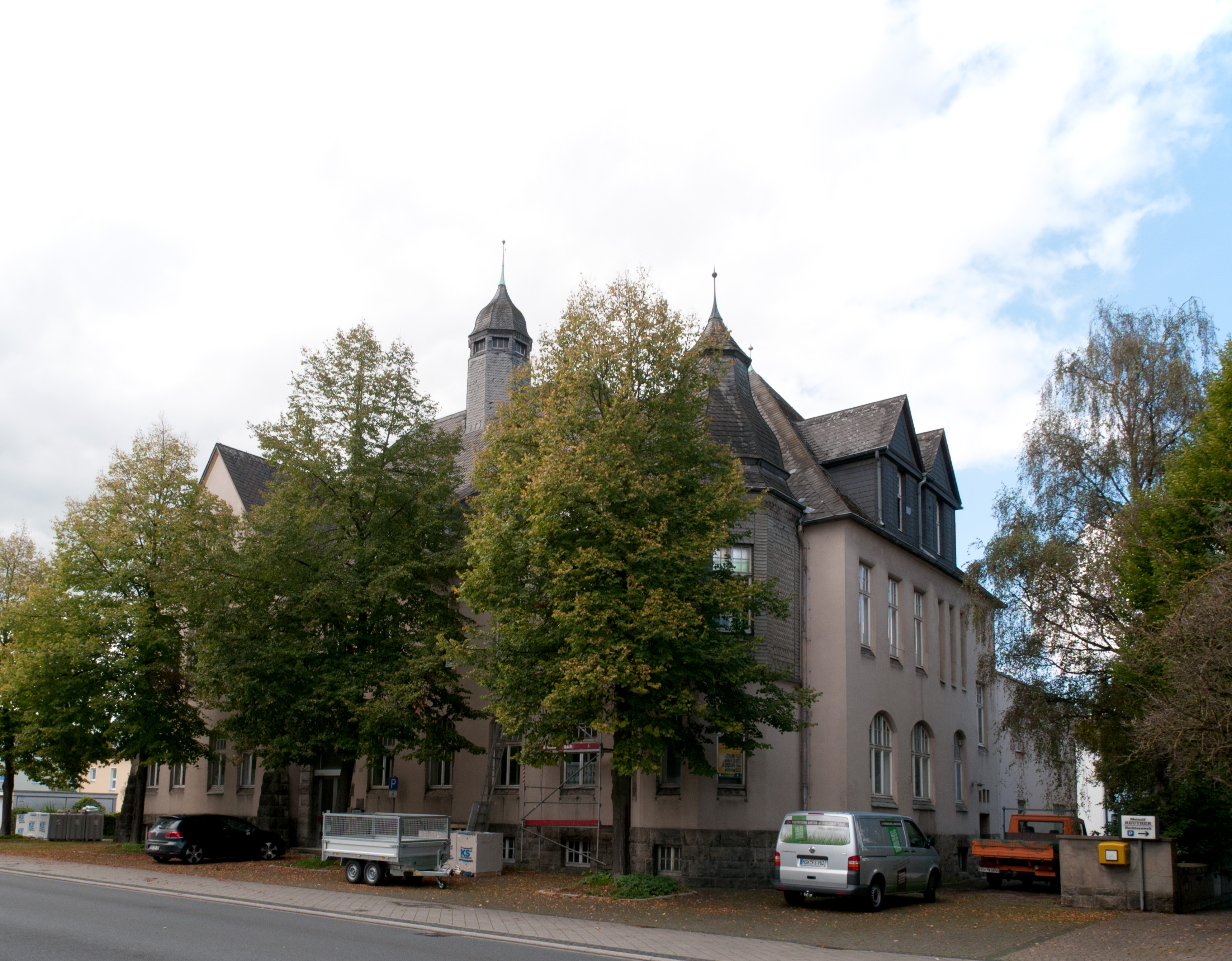 Ehemaliges Amtshaus des Amtes Hüsten